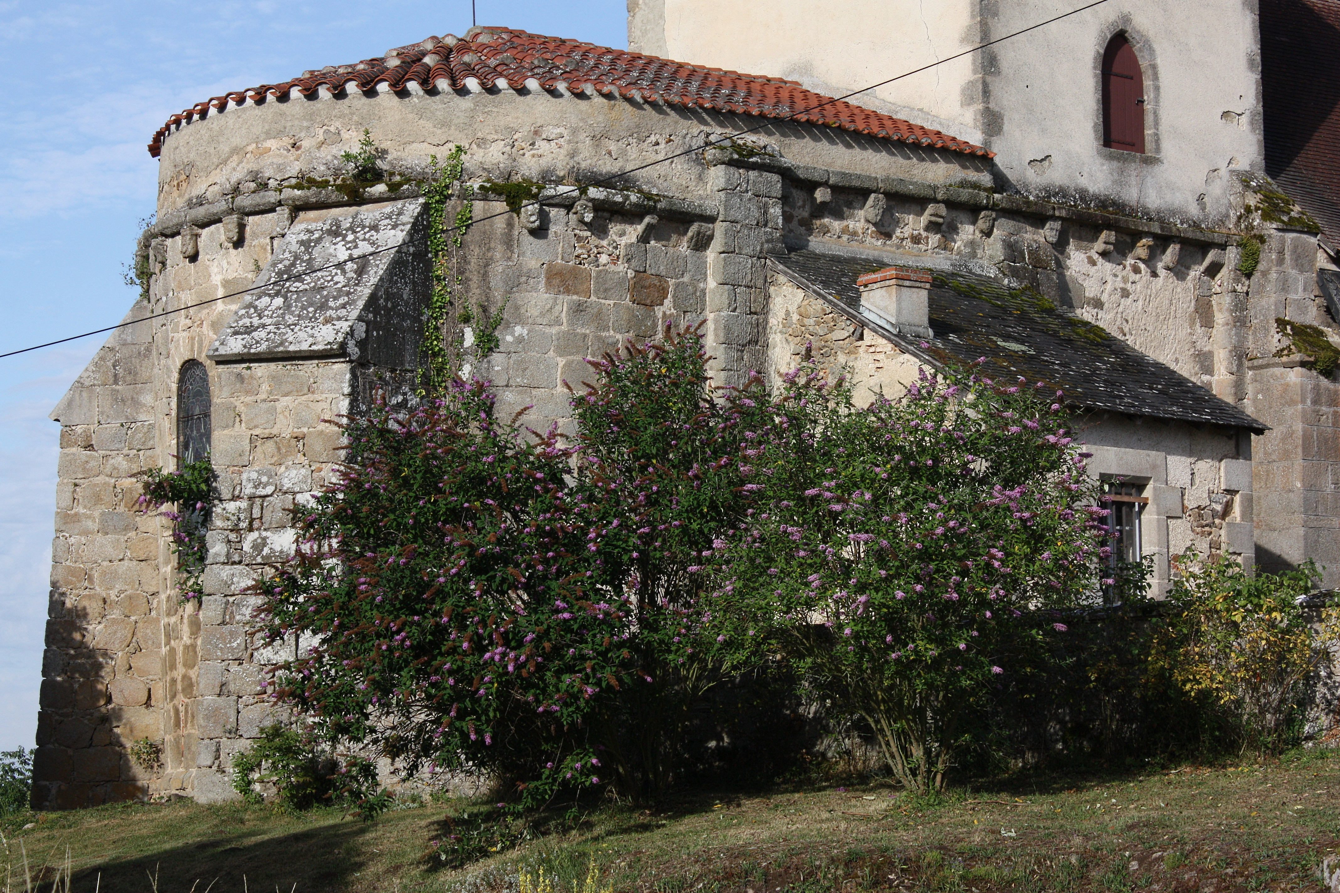 Mazeirat - Eglise